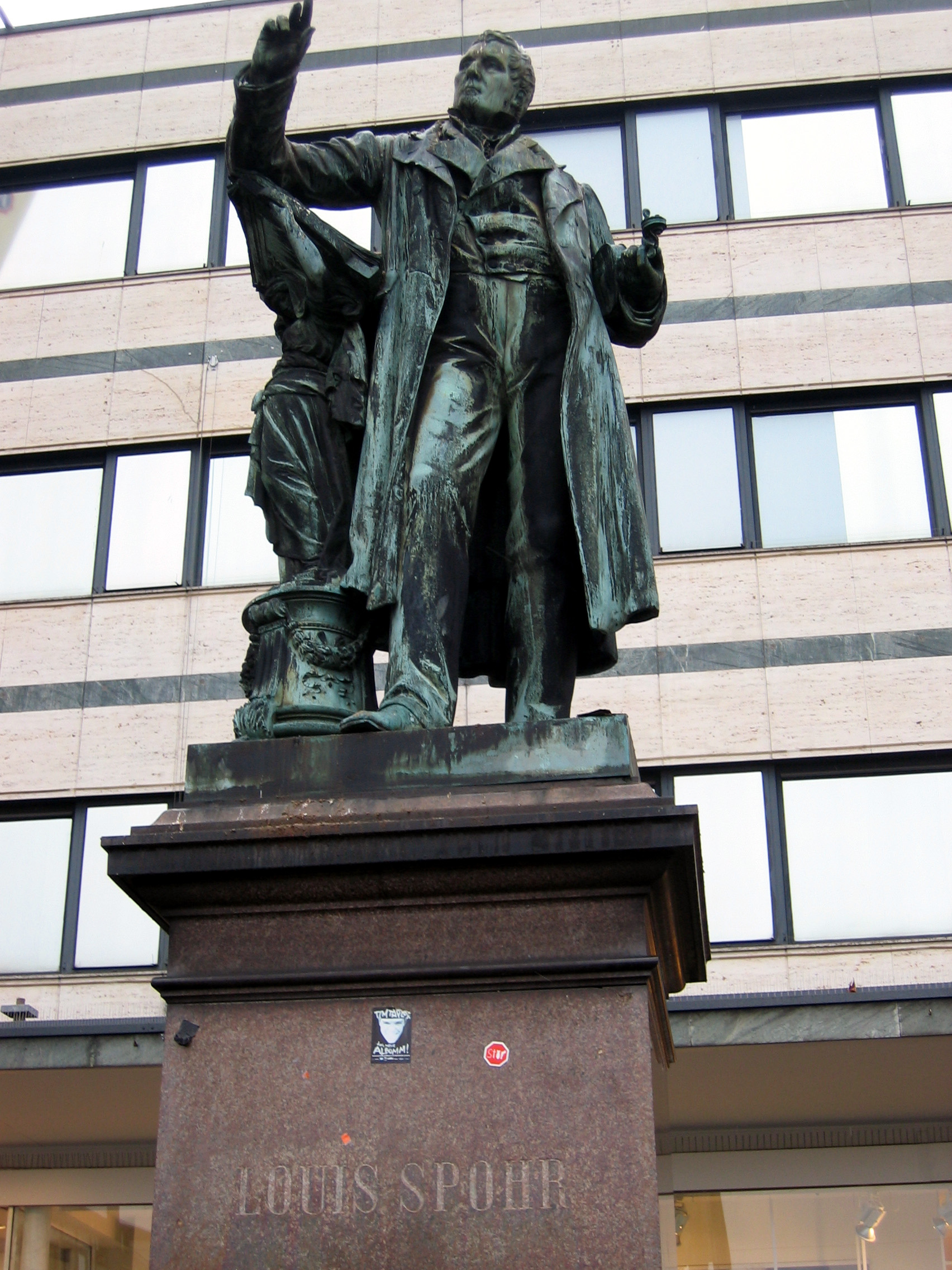 Kassel, Louis Spohr Denkmal auf dem Opernplatz. Bildhauer: Carl Ferdinand Hartzer